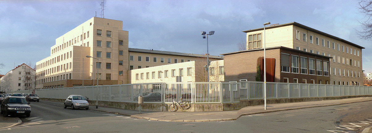 Fassade des Landeskriminalamtes Niedersachsen in Hannover.